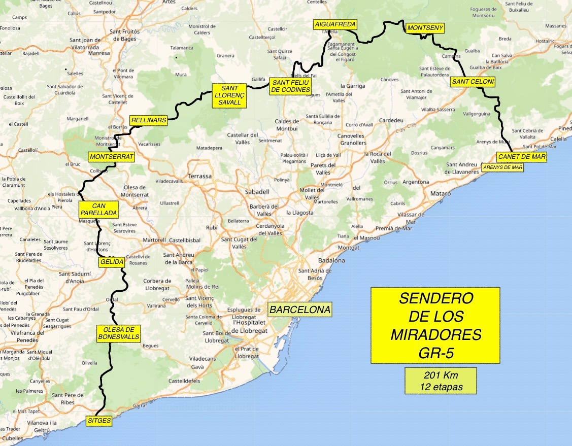 Mapa esbozo del sendero de los Miradores o de los Parques Naturales GR-5 de Cataluña